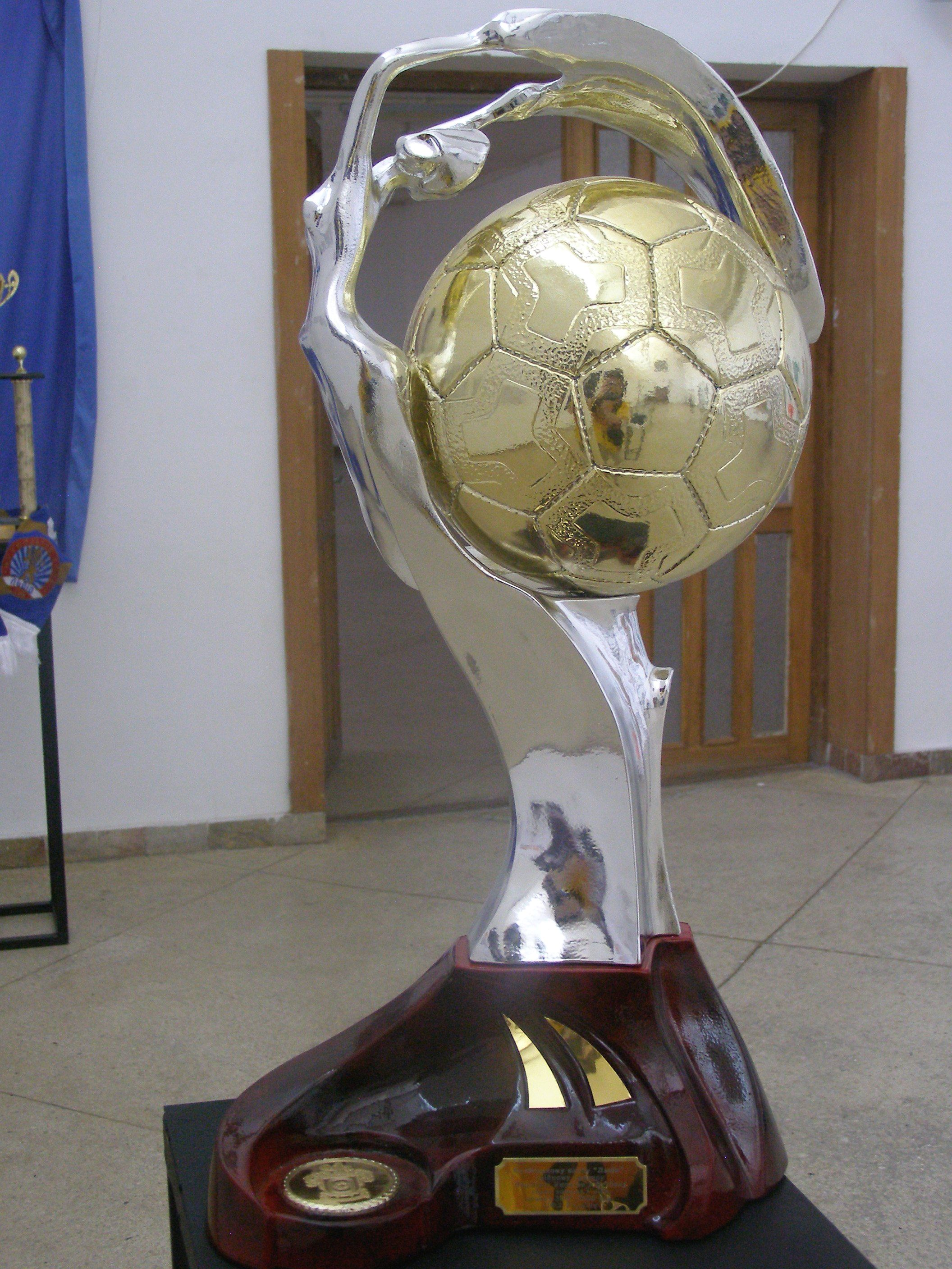 Auszeichnung für FK Lwiw für 2. Platz in der 1. Liga (Saison 2007/08)